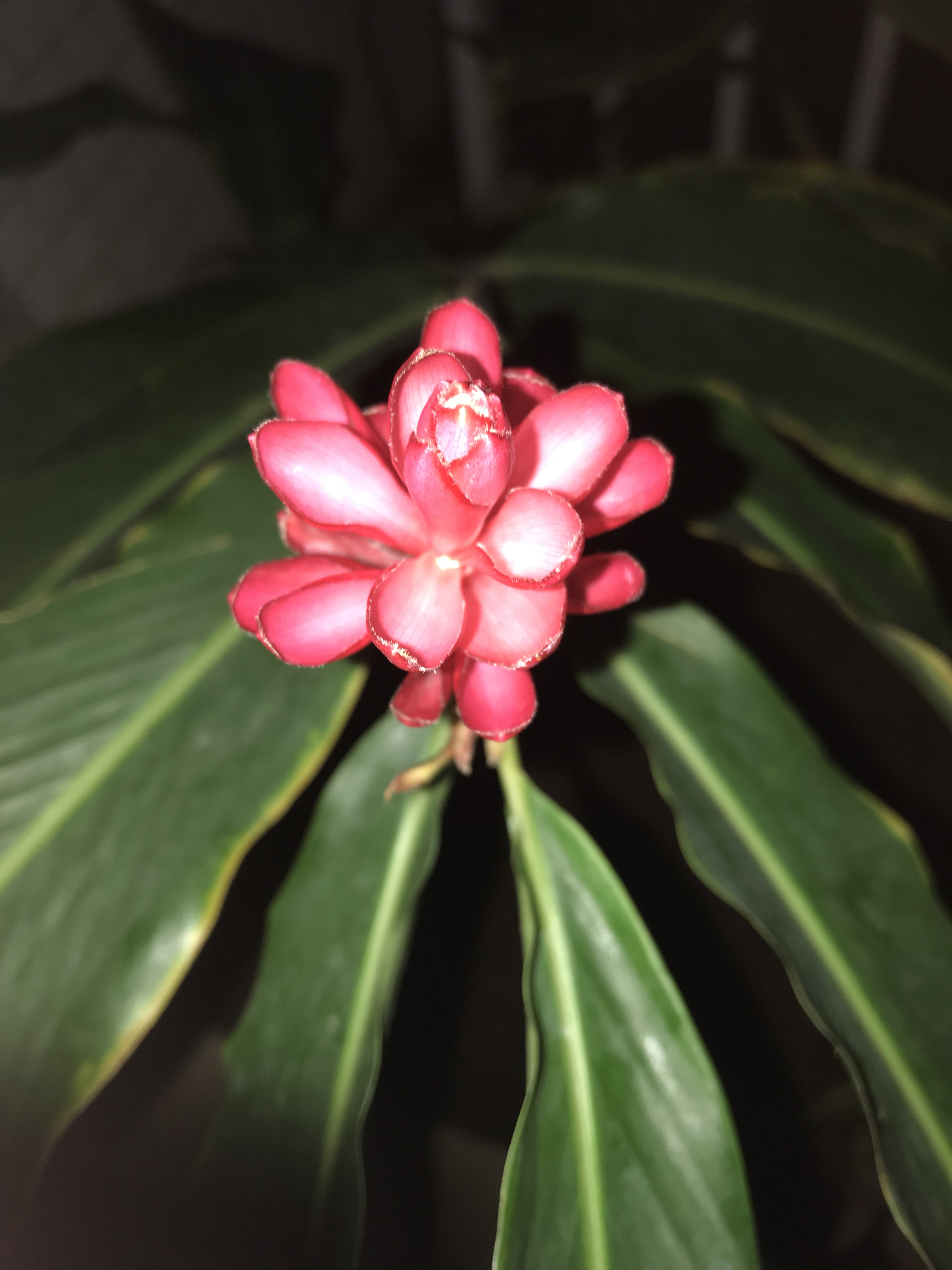 Planta tropical pouco resistente ao frio, utilizada em jardins